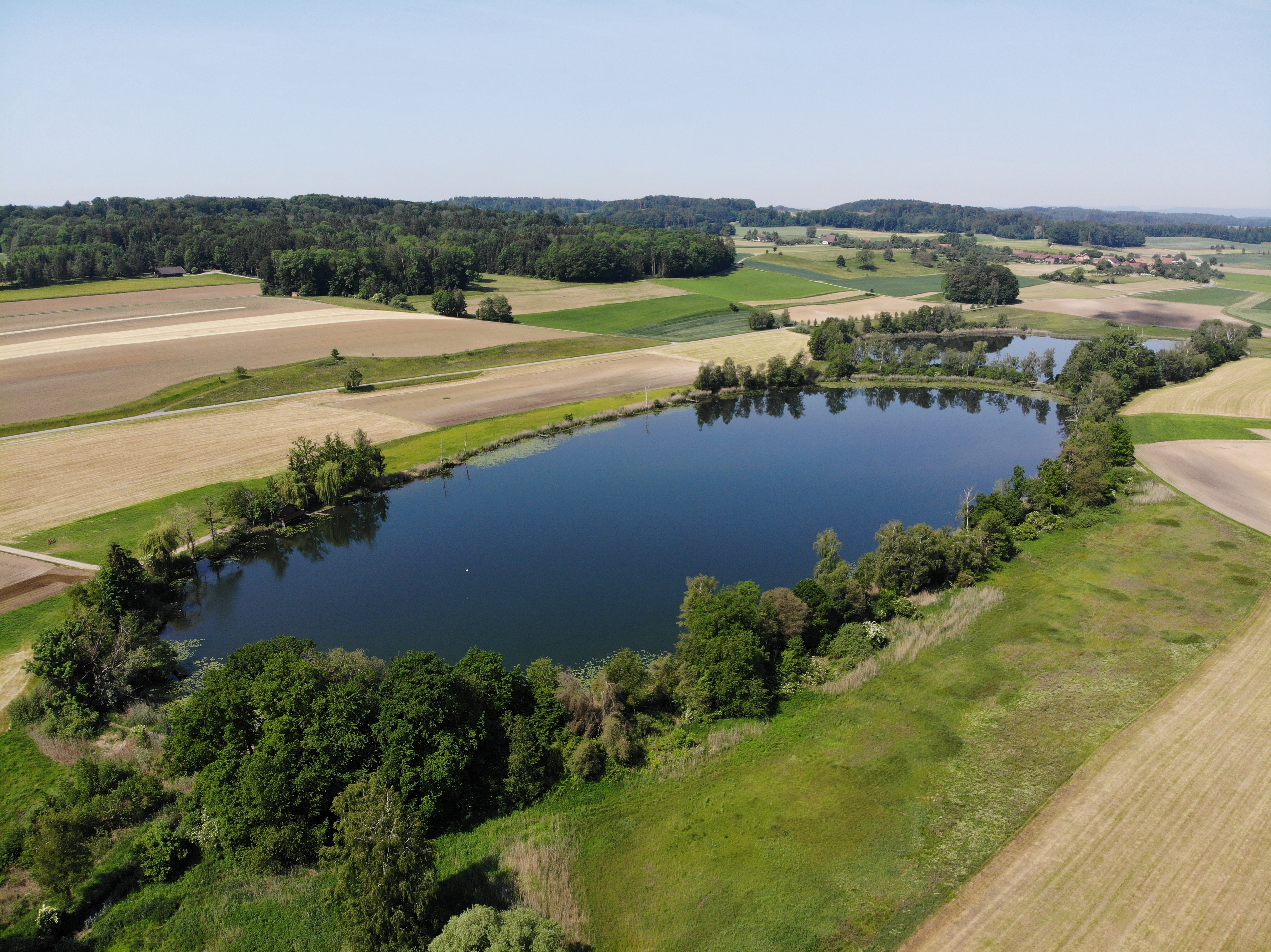 Hasensee Ansicht von Osten